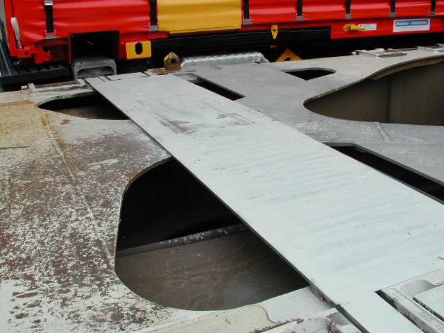 Mobilerblech auf einem 8ax-Waggon